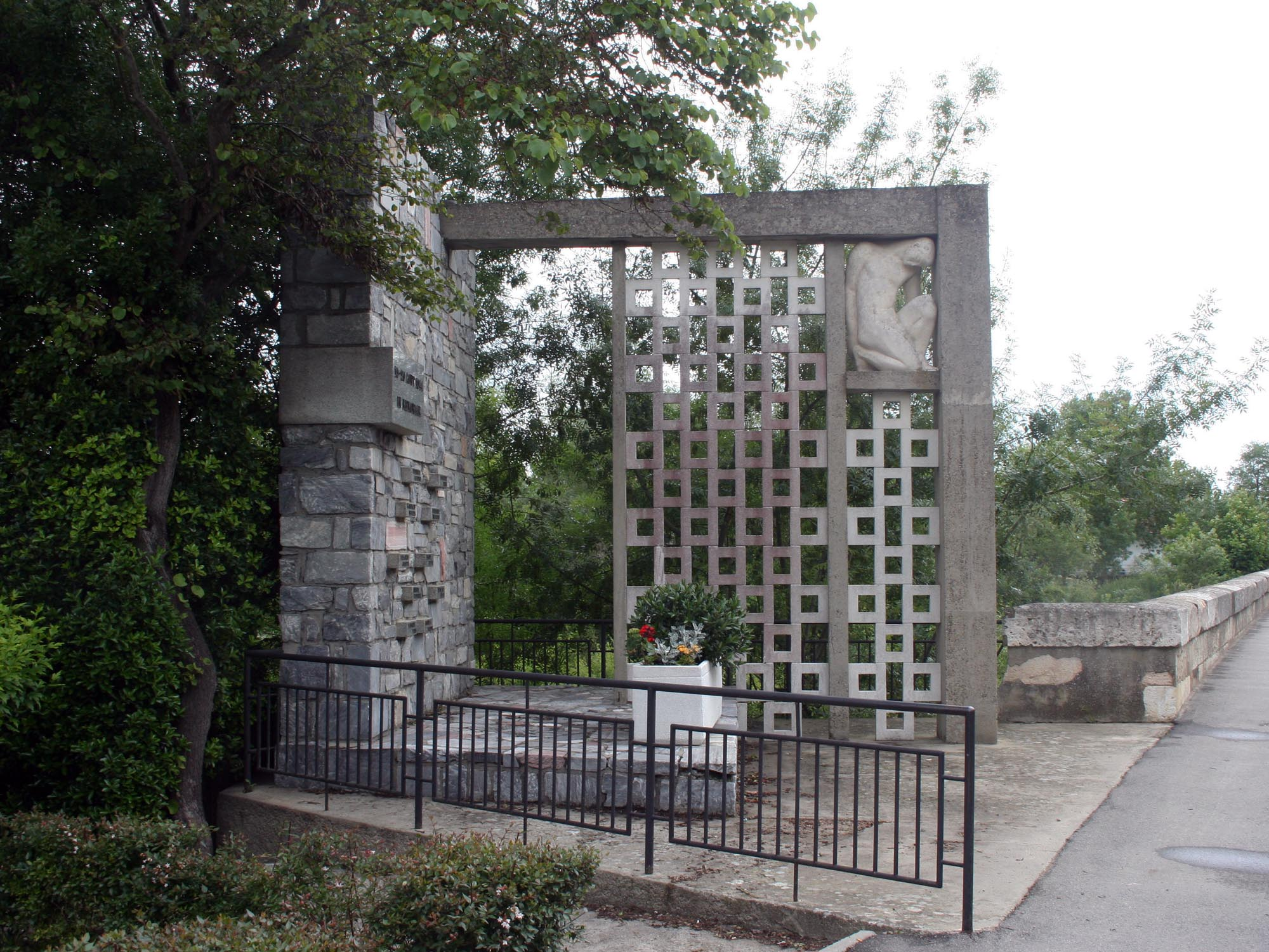 Monument aux combattants du 20 août 1944, à l'Isle-Jourdain (Gers, France)